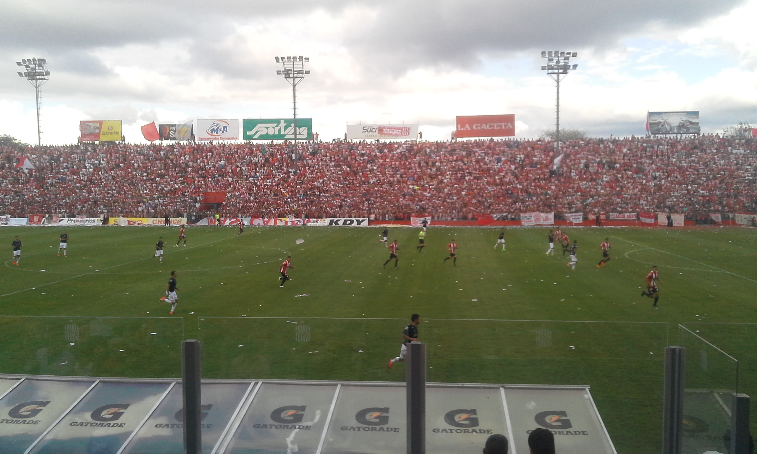 san martin de tuc 2